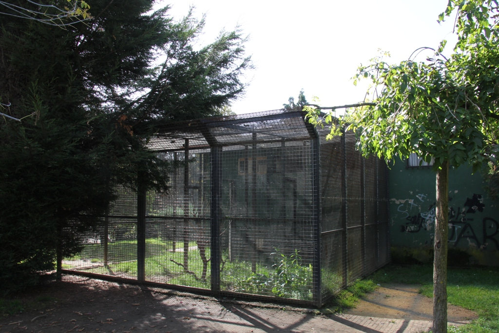 Edificio de la Asociación Ornitológica Leonesa